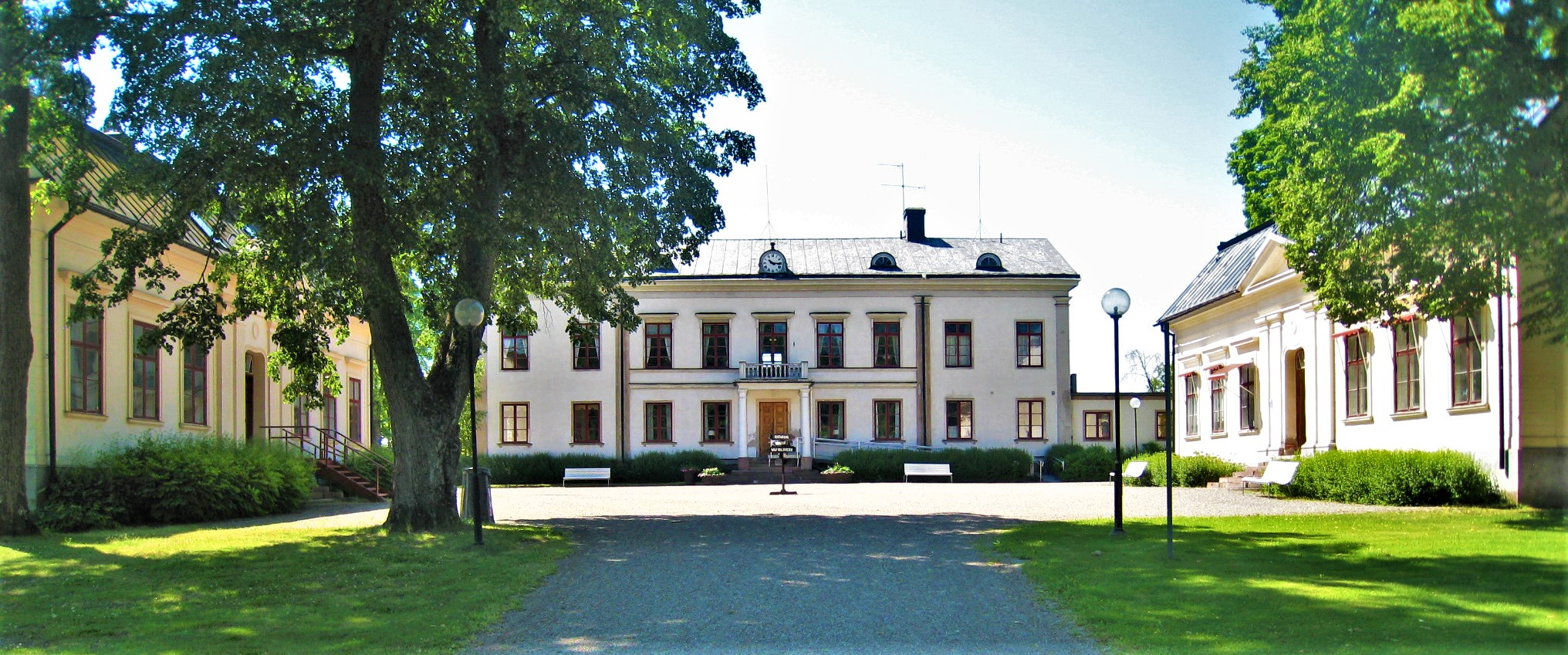 Wij herrgård, Ockelbo, Gästrikland.